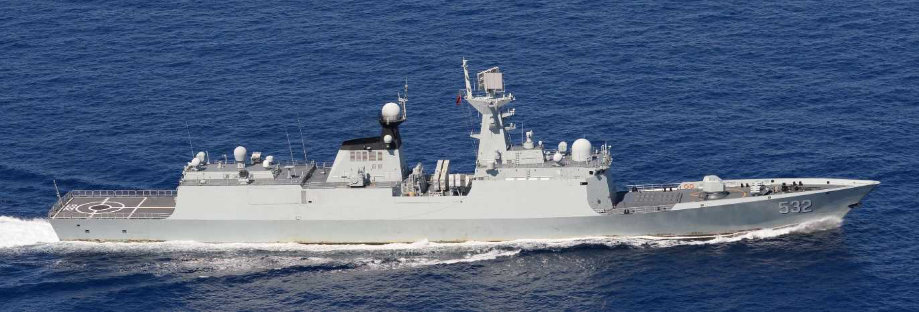 ７月２７日（土）午前７時頃、海上自衛隊第５航空群所属「Ｐ－３Ｃ」（那覇）及び佐世保地方隊所属「あまくさ」（佐世保）が、宮古島の北約２４０ｋｍの海域を南下する中国海軍ルーヤンⅢ級ミサイル駆逐艦１隻、ジャンカイⅡ級フリゲート１隻の計２隻を確認した。 その後、これらの艦艇が沖縄本島と宮古島の間の海域を南下し、太平洋へ向けて航行したことを確認した。